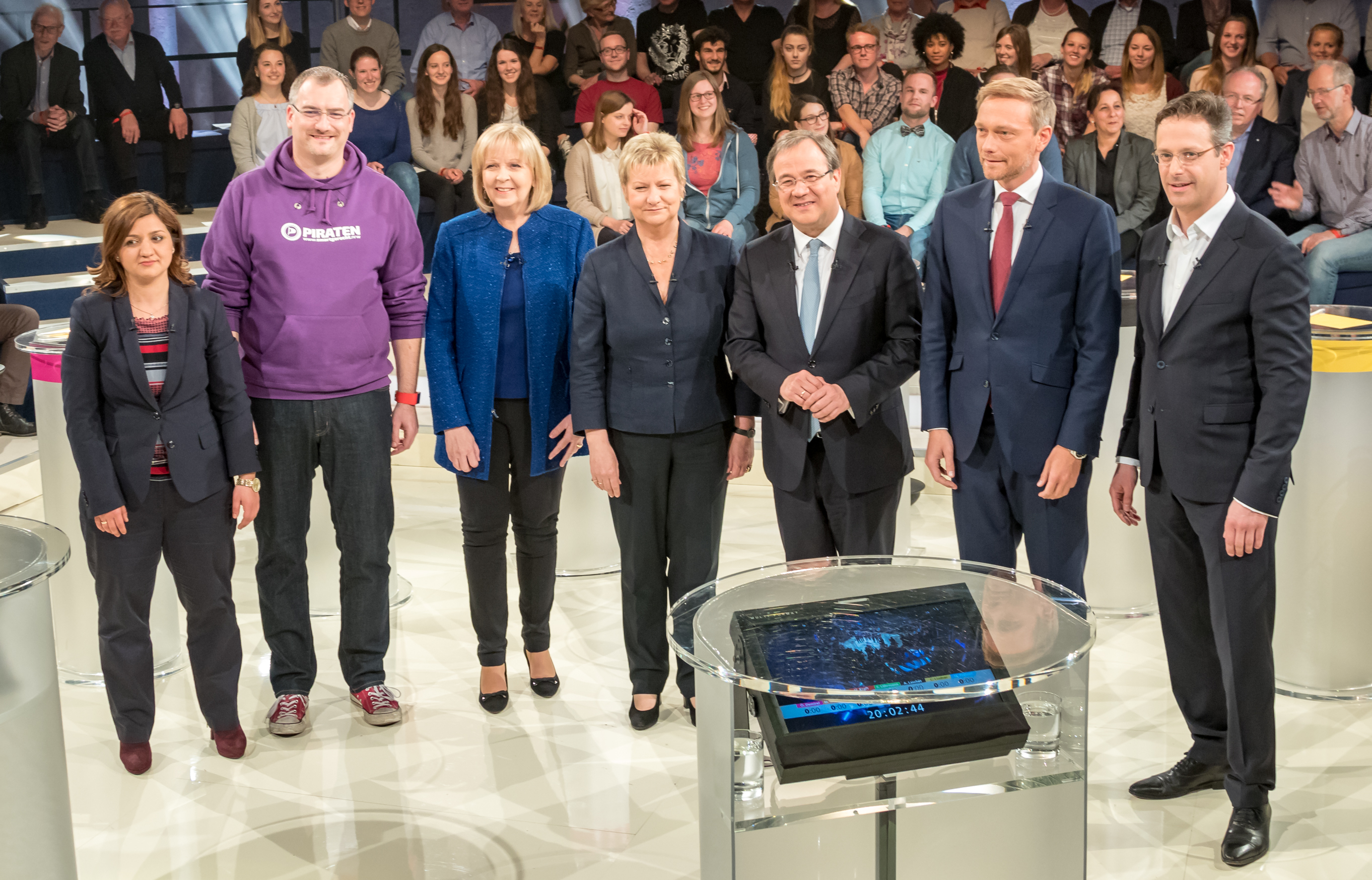 WDR-Sendung Wahl-Arena, Donnerstag, 4. Mai 2017 zur NRW-Wahl. Özlem Alev Demirel (Die Linke), Michele Marsching (Piratenpartei Deutschland), Hannelore Kraft (SPD), Sylvia Löhrmann (Bündnis 90/Die Grünen), Armin Laschet (CDU), Christian Lindner (FDP), Marcus Pretzell (AfD)